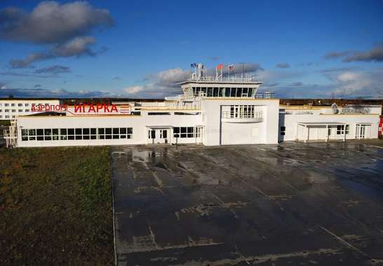 Aeroport_Igarka